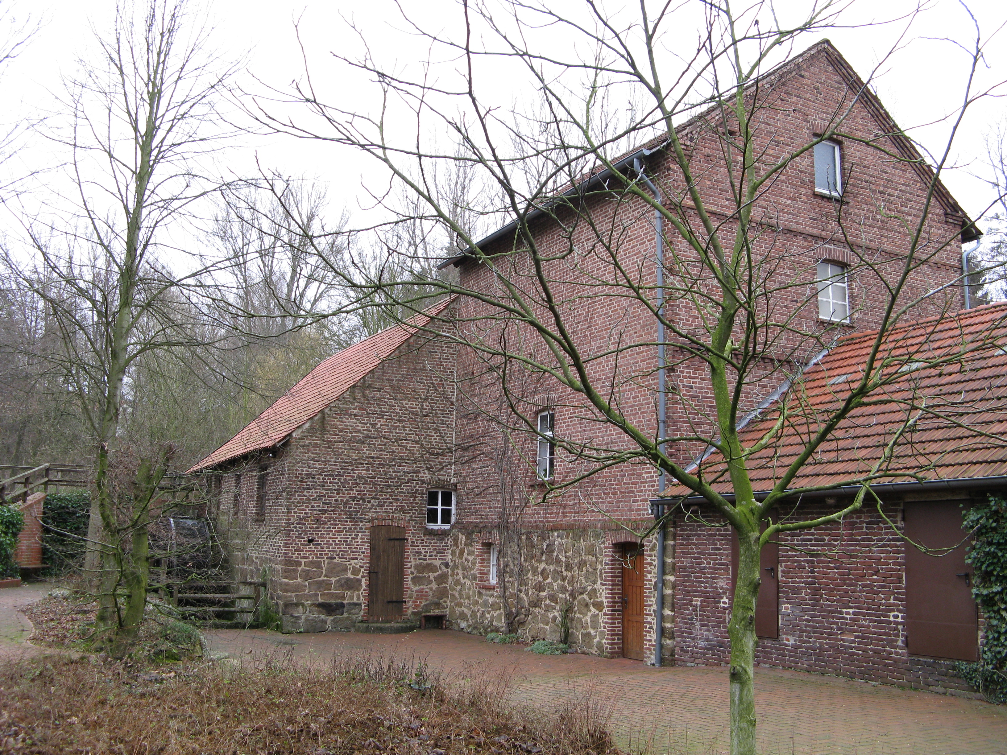 Mühle Bergkirchen